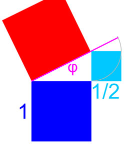 Construction à la règle et au compas du nombre d'or